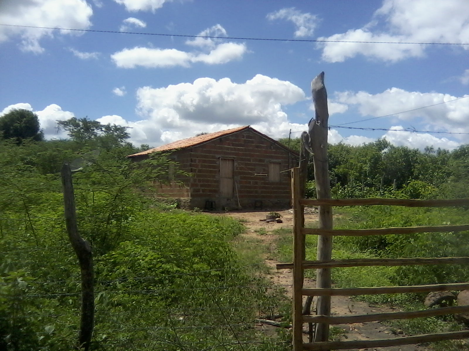 Reriutaba - State of Ceará, Brazil